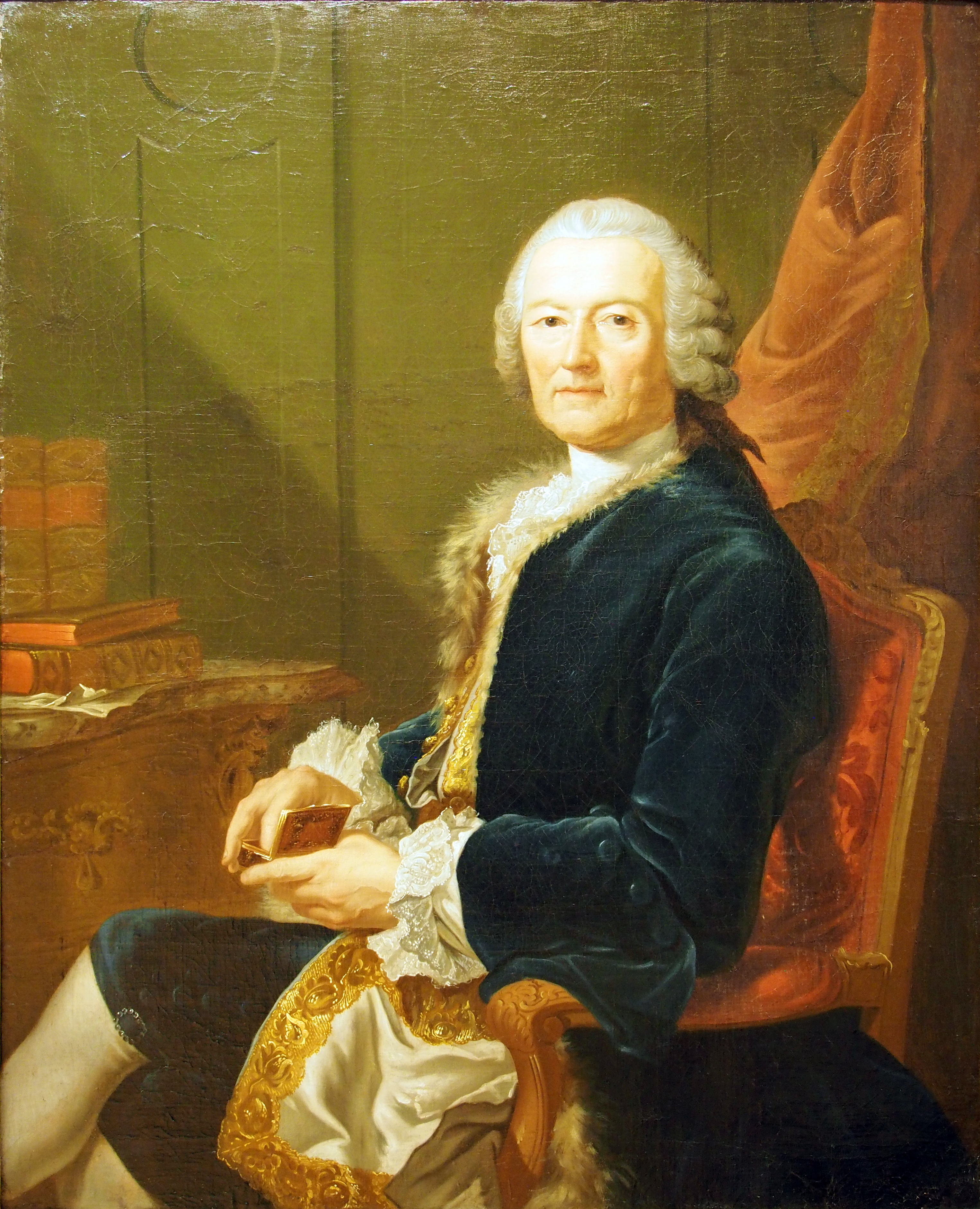 Graf von Stadion war der Urgroßvater von Clemens und Bettina Brentano